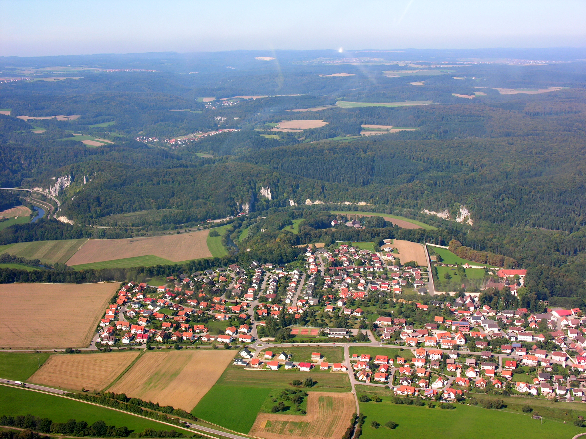 Germany, Baden-Württemberg, Aerial view of Inzigkofen